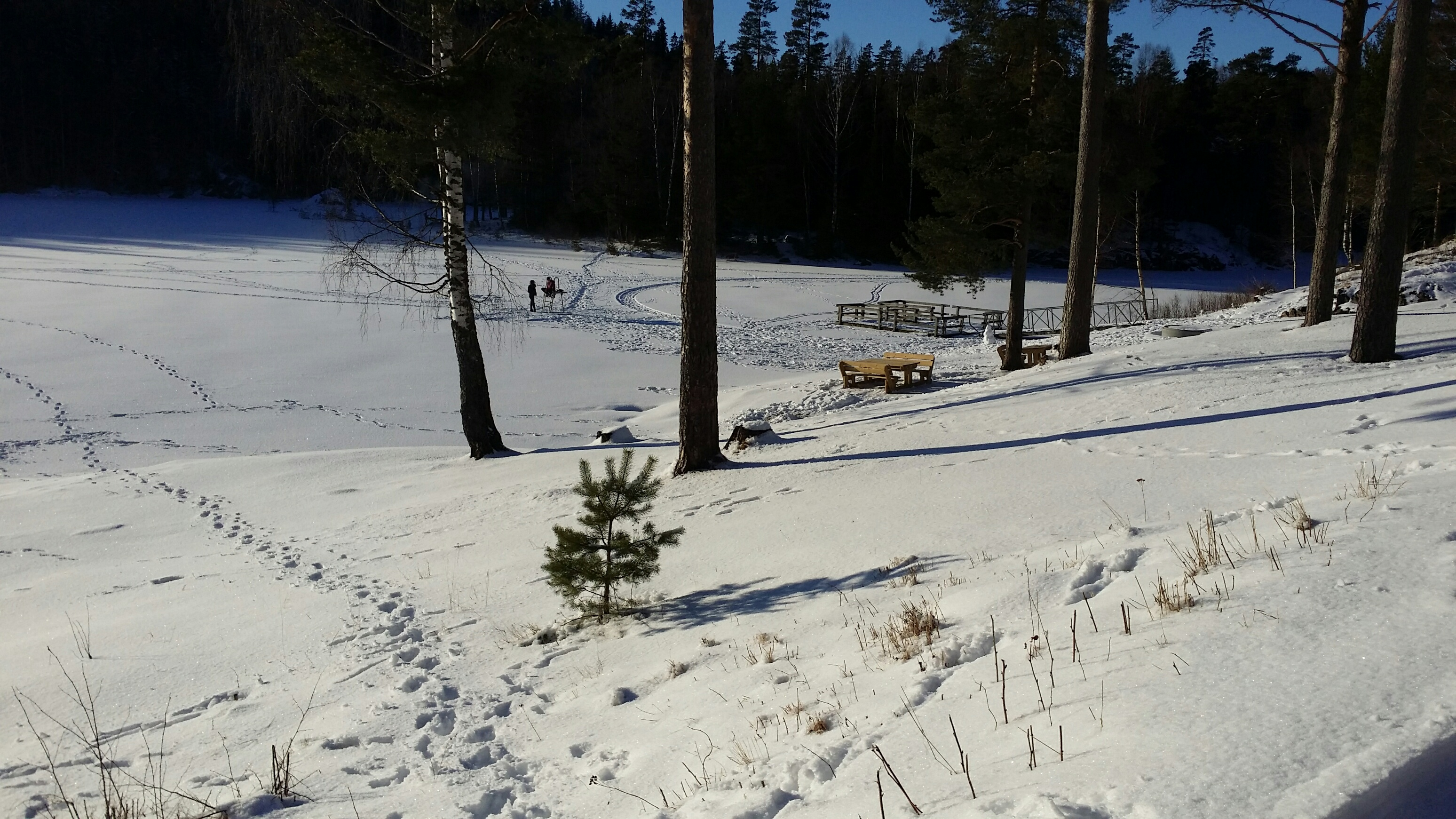 Ved dammens nordøstre ende er det tilrettelagt for friluftsliv både sommer- og vintersesong